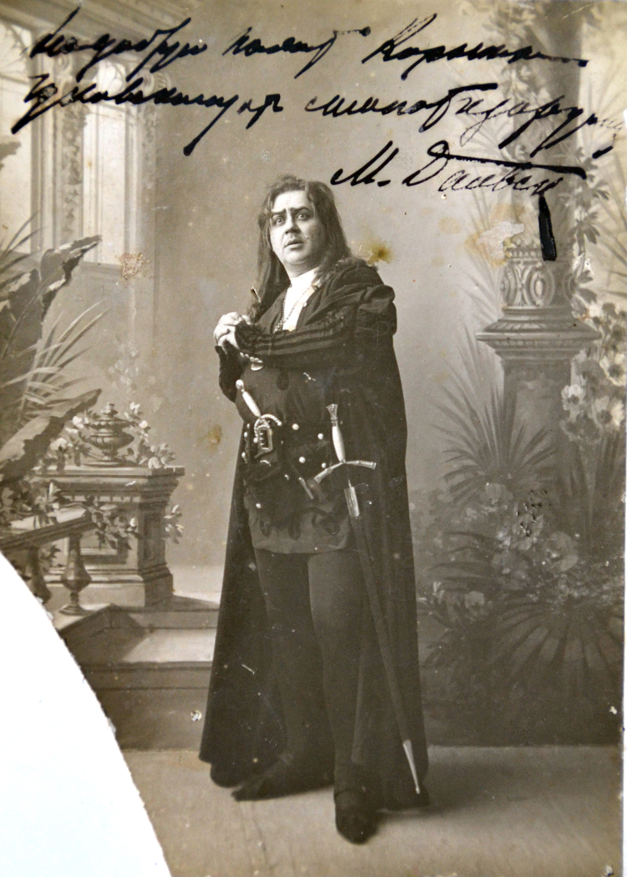 Мамонт Викторович Дальский. Автограф к Корнею Чуковскому.